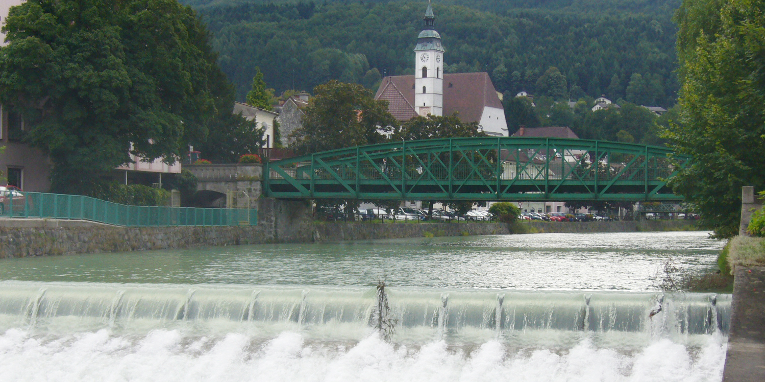 Scheibbs with River Erlauf